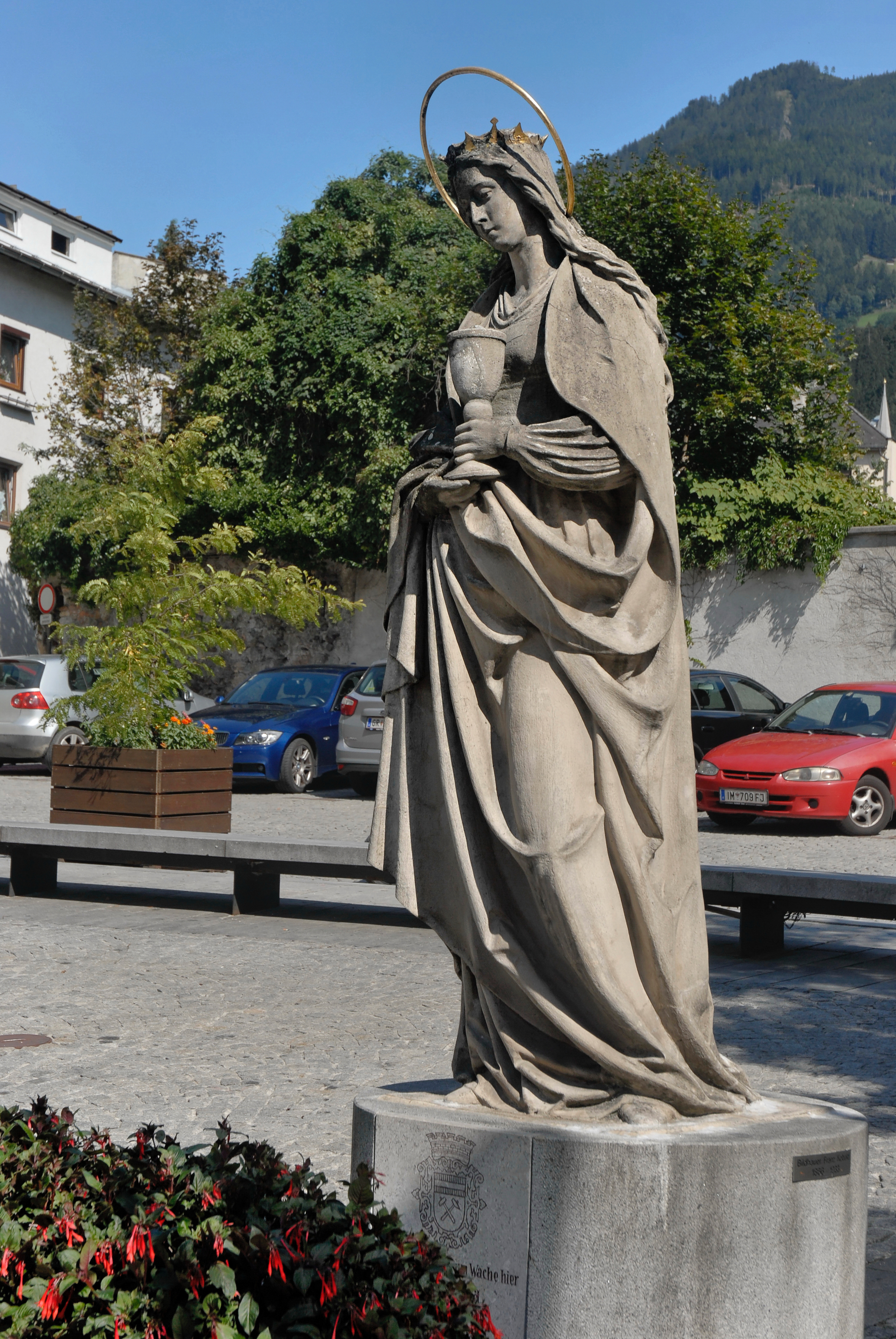 Figurenbildstock Hl. Barbara am Pfundplatz in Schwaz